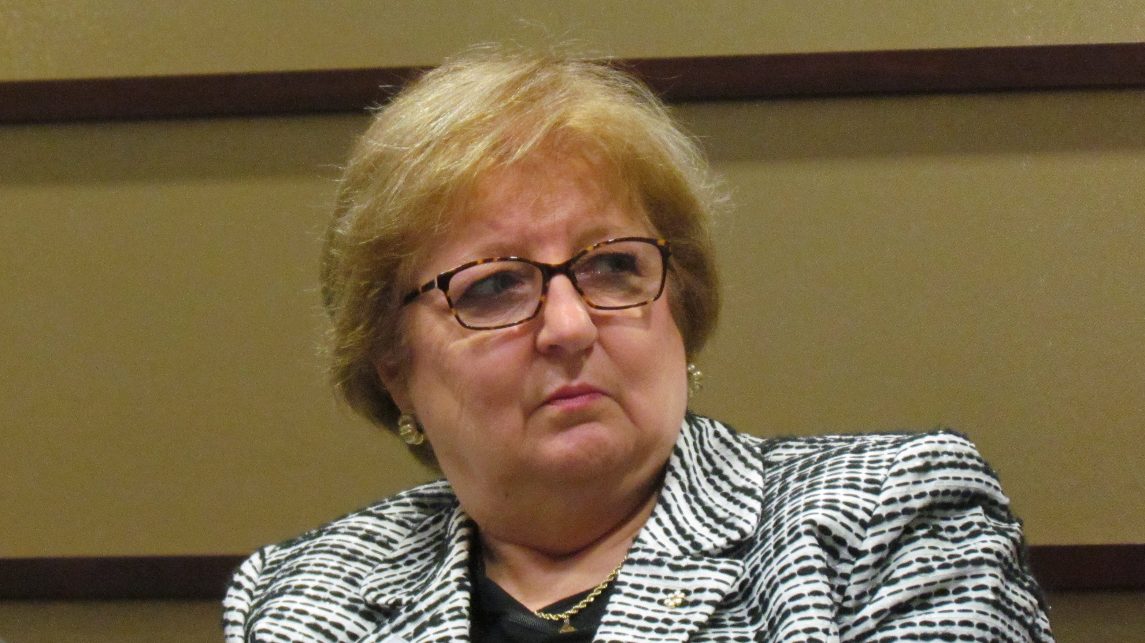 La diplomate canadienne Louise Fréchette en mai 2015